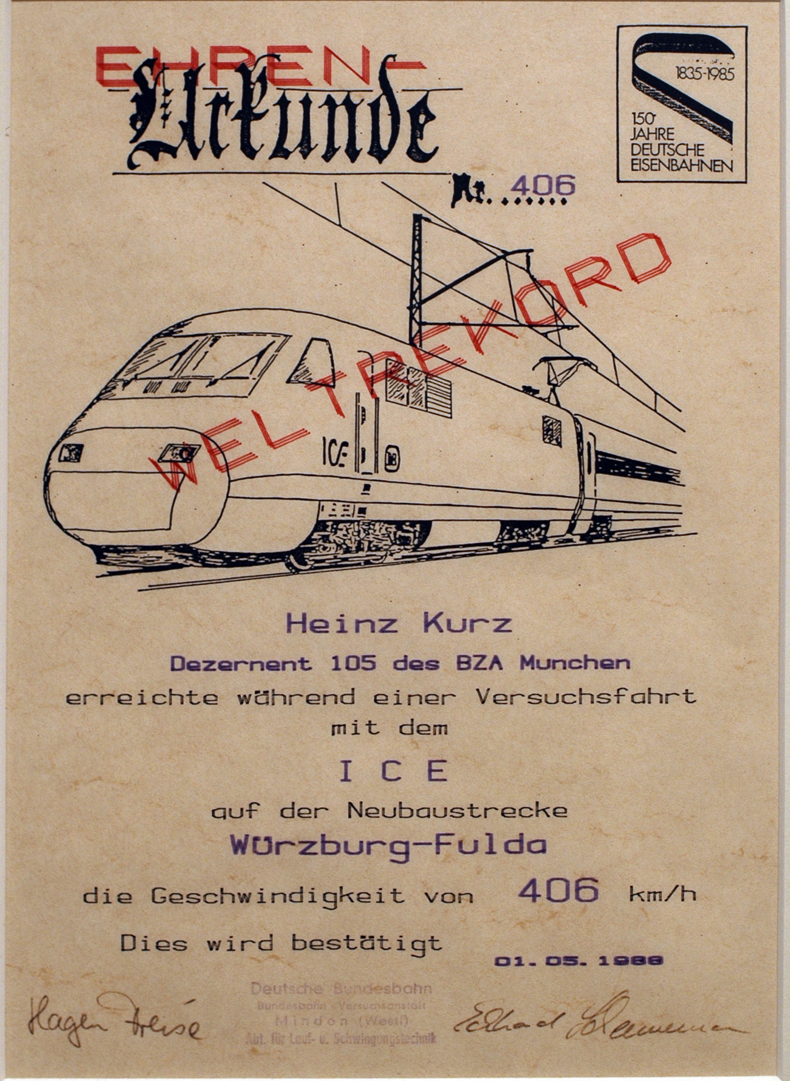 Verkehrsmuseum Nürnberg